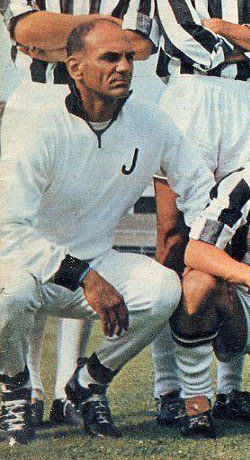 L'allenatore brasiliano Paulo Lima Amaral alla Juventus nella stagione 1963-64.